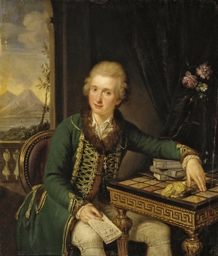 Portrait of Count Michael Johann von der Borch